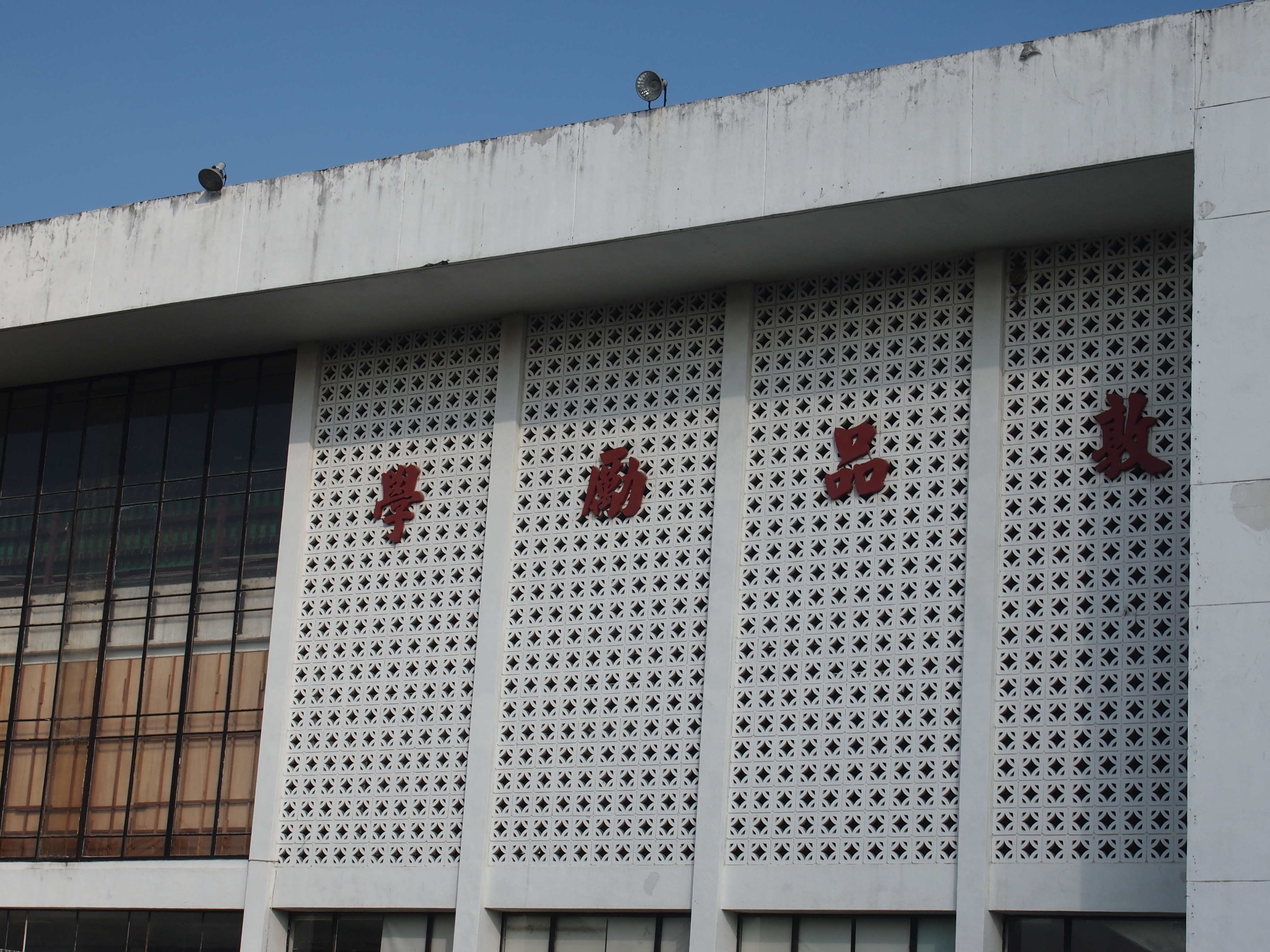 台大校訓-敦品勵學